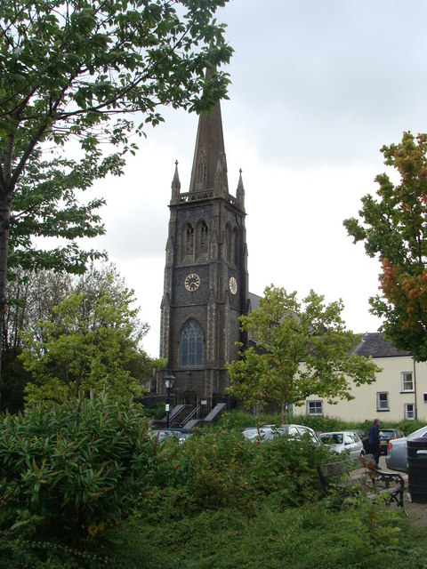 Aberdare, Wales